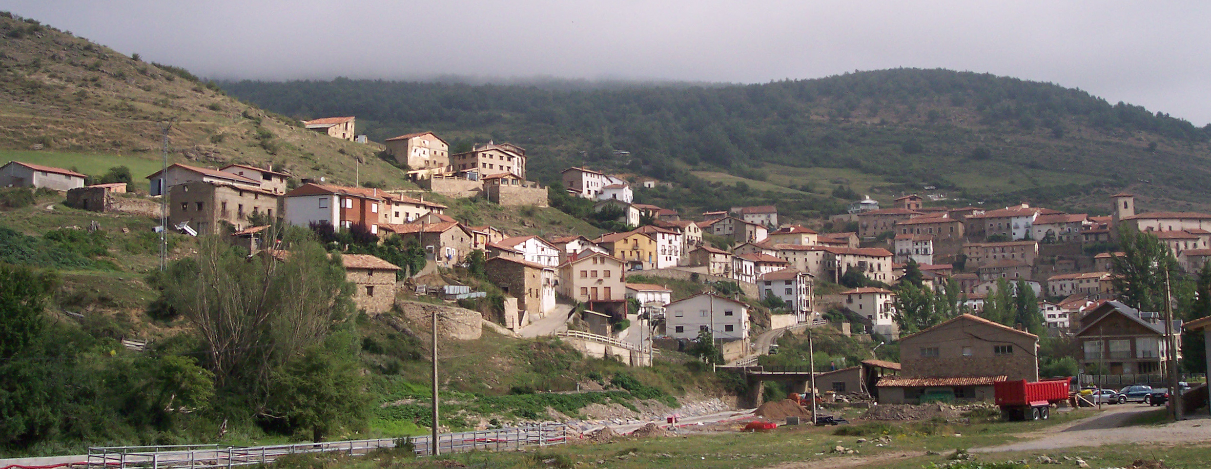 Foto hecha desde mi coche y "trucada" para que aparezca de forma horizontal